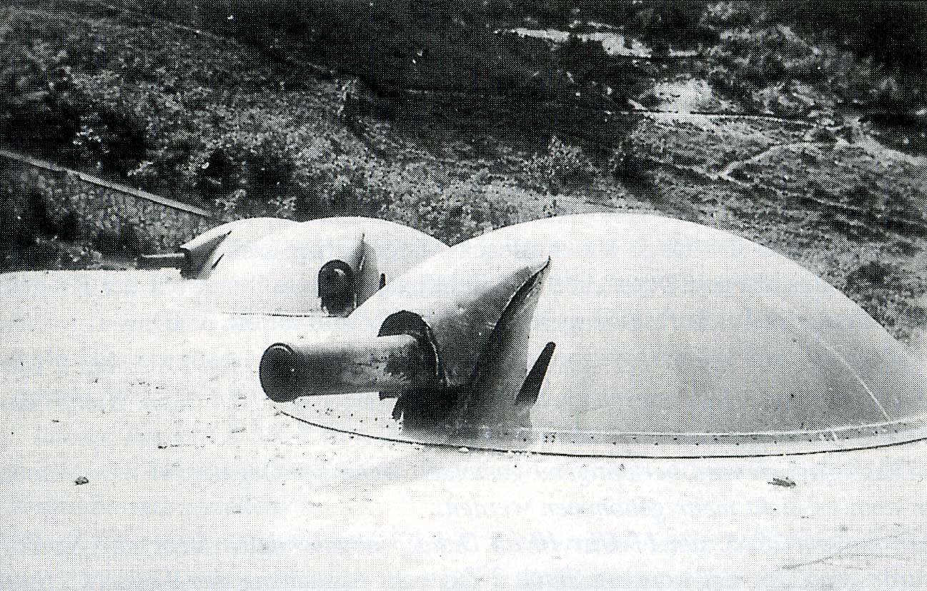 Panzerbatterie des Forte Casa Ratti